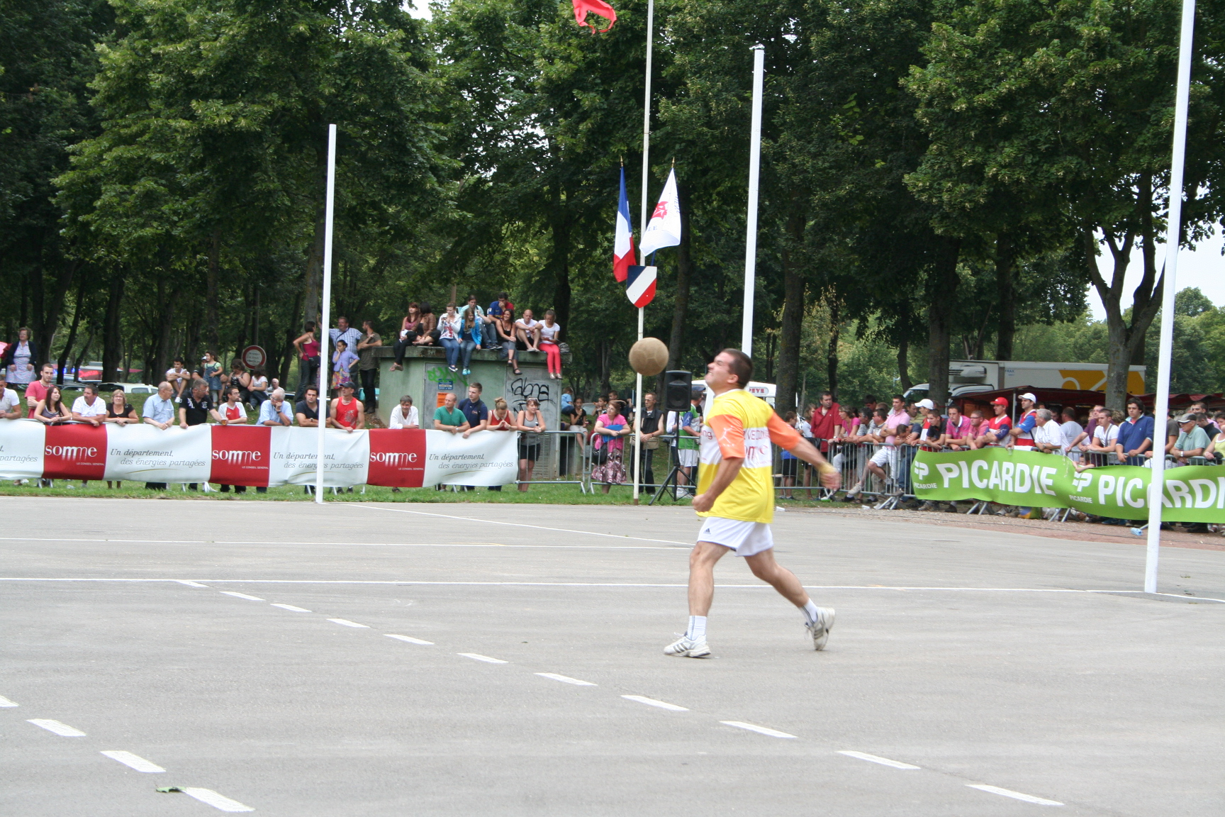 ballon au poing - championnat de France 2012 à Amiens Picard: Balon au poing - Campionat d'Franche - 2012 - La Hotoie (Anmien)